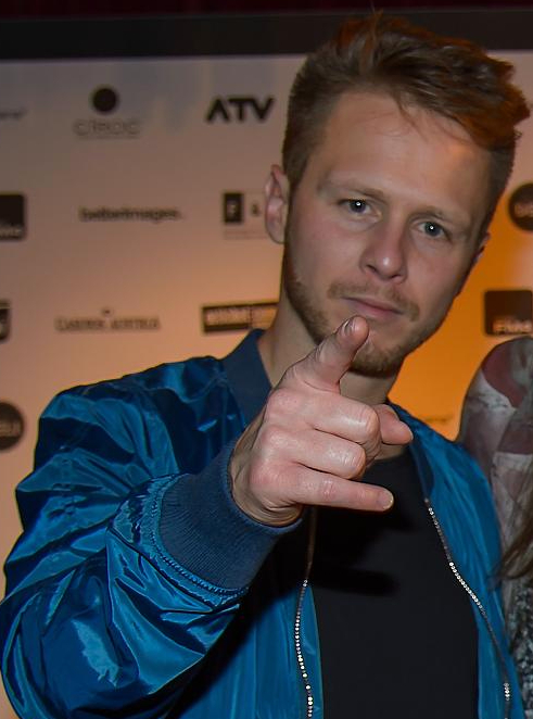 Lukas Hillebrand, österreichischer Produzent und Songwriter, 2015